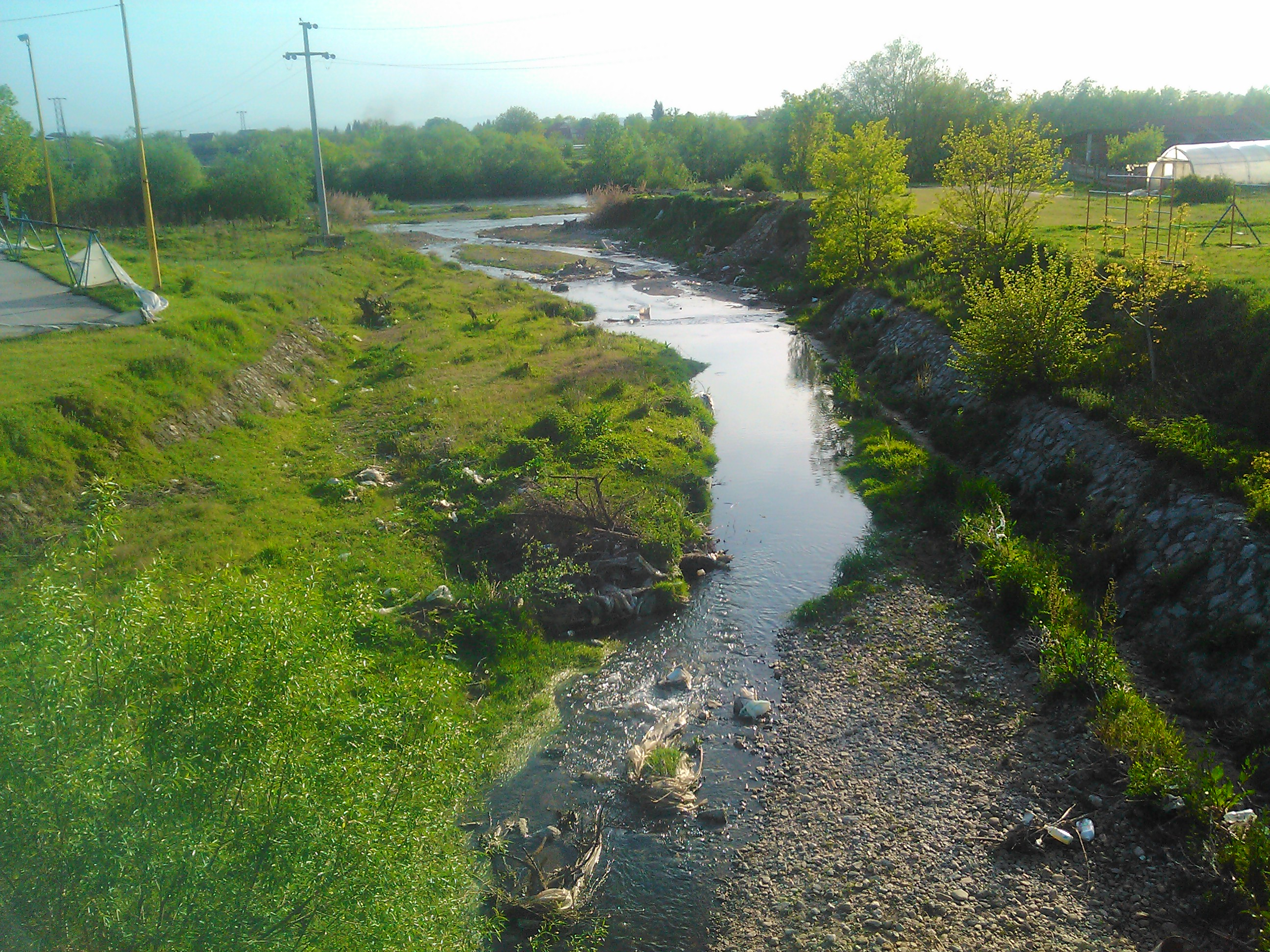 Srpski (latinica): Orašačka reka